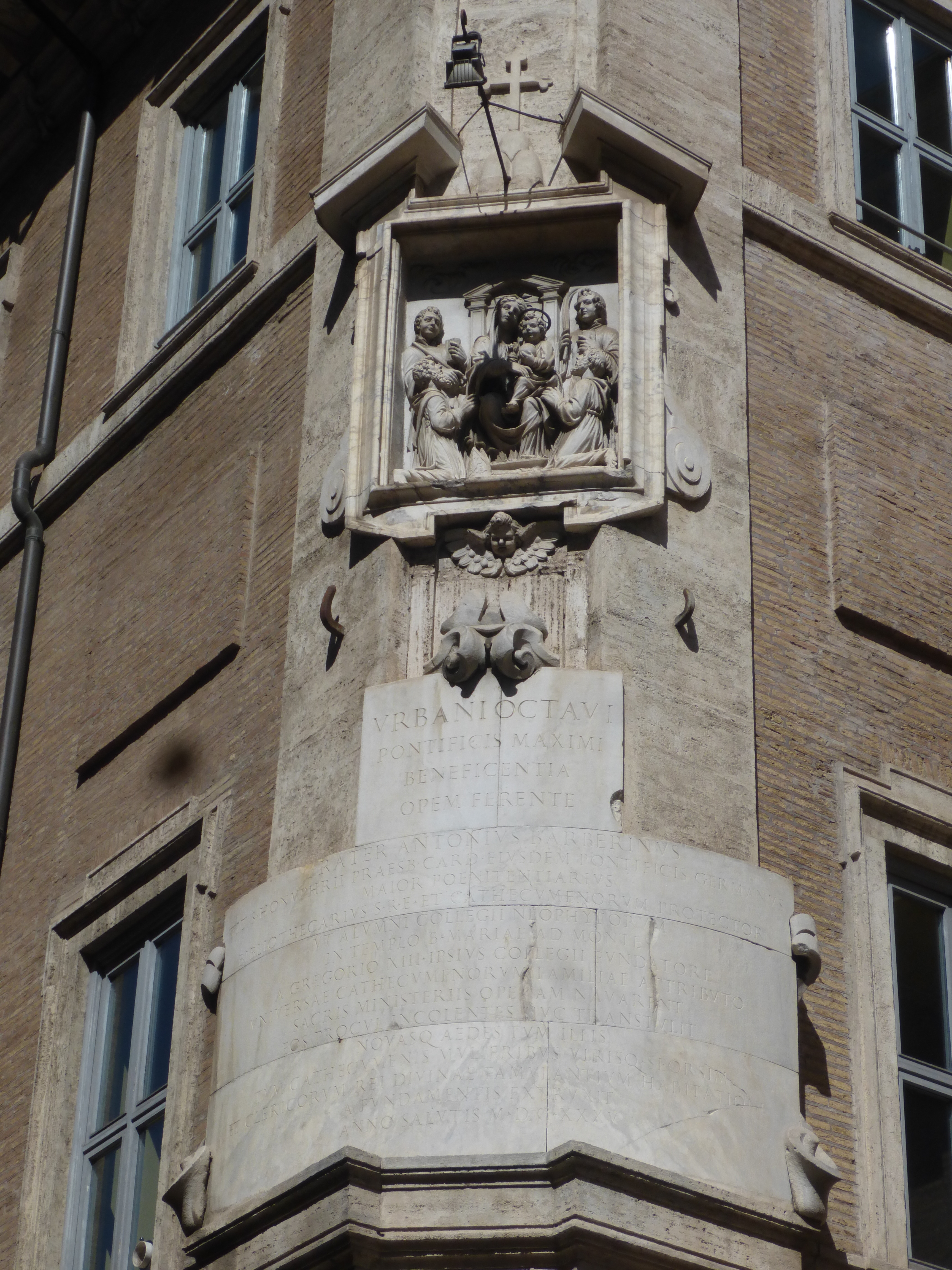 Roma, via Madonna dei Monti, Collegio dei Neofiti. Edicola della Madonna con i santi Stefano e Lorenzo, e dedica del card. Antonio Barberini (1635)